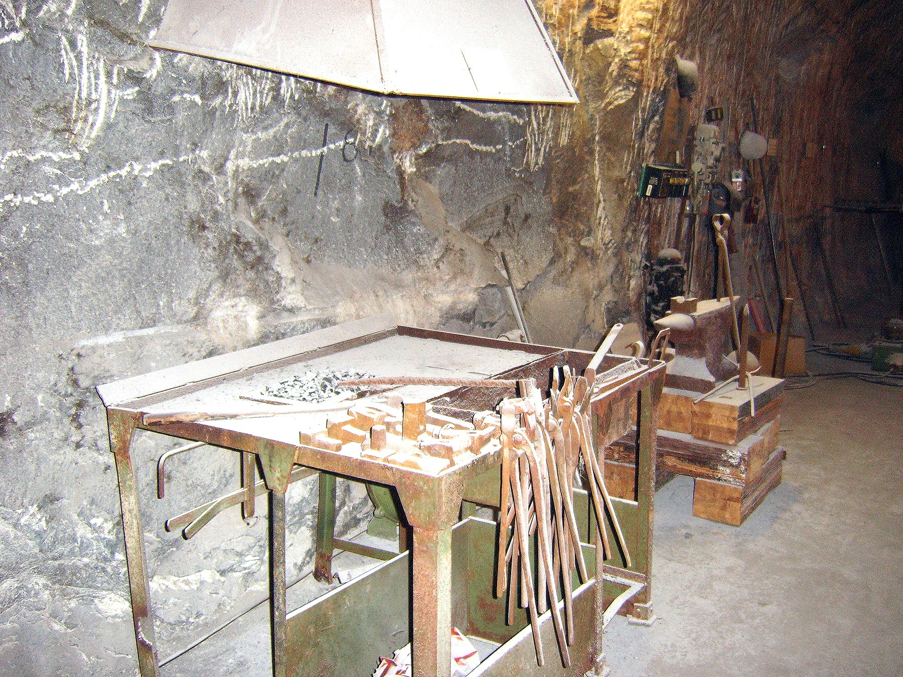 Untertage-Schmiedewerkstatt (hier: früher voll funktionstüchtiges, heute nur noch Anschauungsobjekt im Steinsalzbergwerk Bernburg).